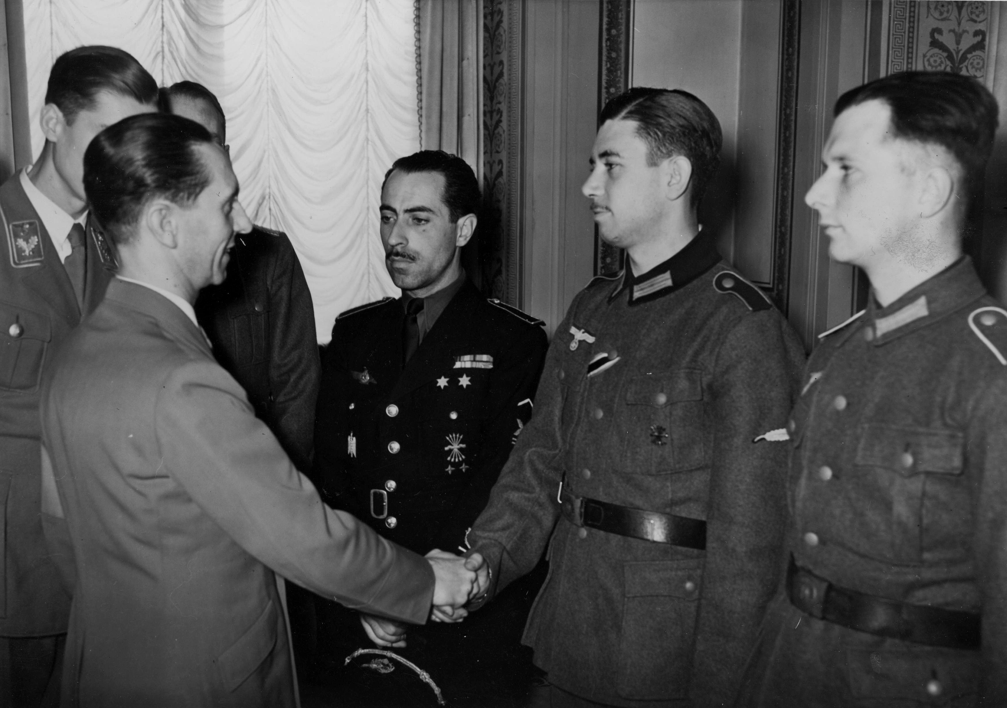 El ministro de propaganda Joseph Goebbels (izquierda) saluda al jefe nacional del SEU José Miguel Guitarte (segundo desde la derecha).